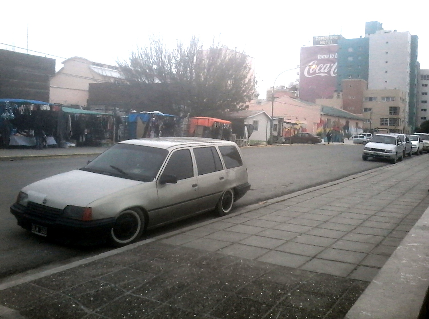 Versión deportiva del Chevrolet Ipanema 1996